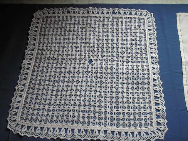 Trabalho do bordado de bainha aberta de Caeté